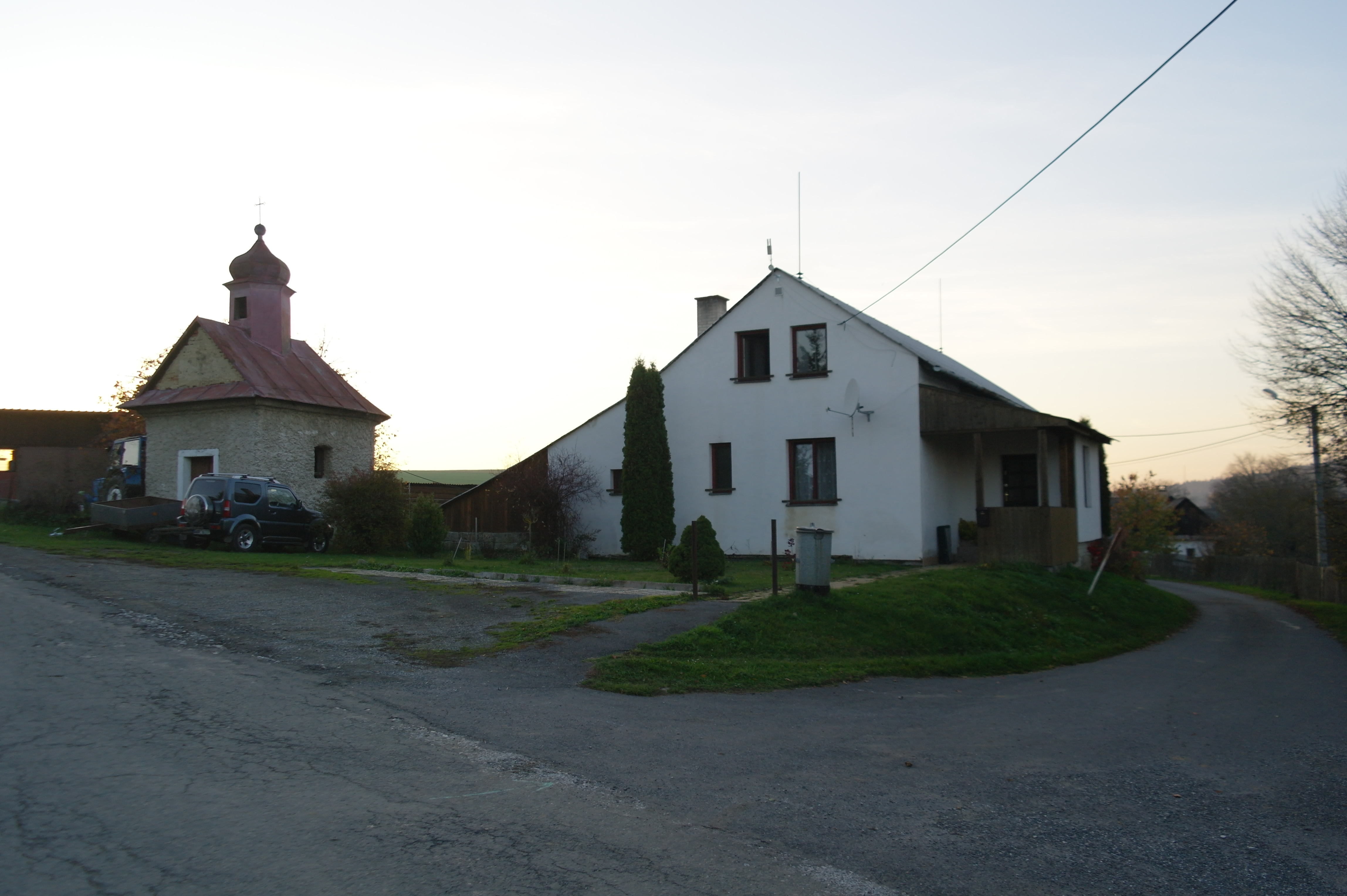 Náves ve vesnici Dlouhá Ves, Olomoucký kraj Project: Fotíme Česko